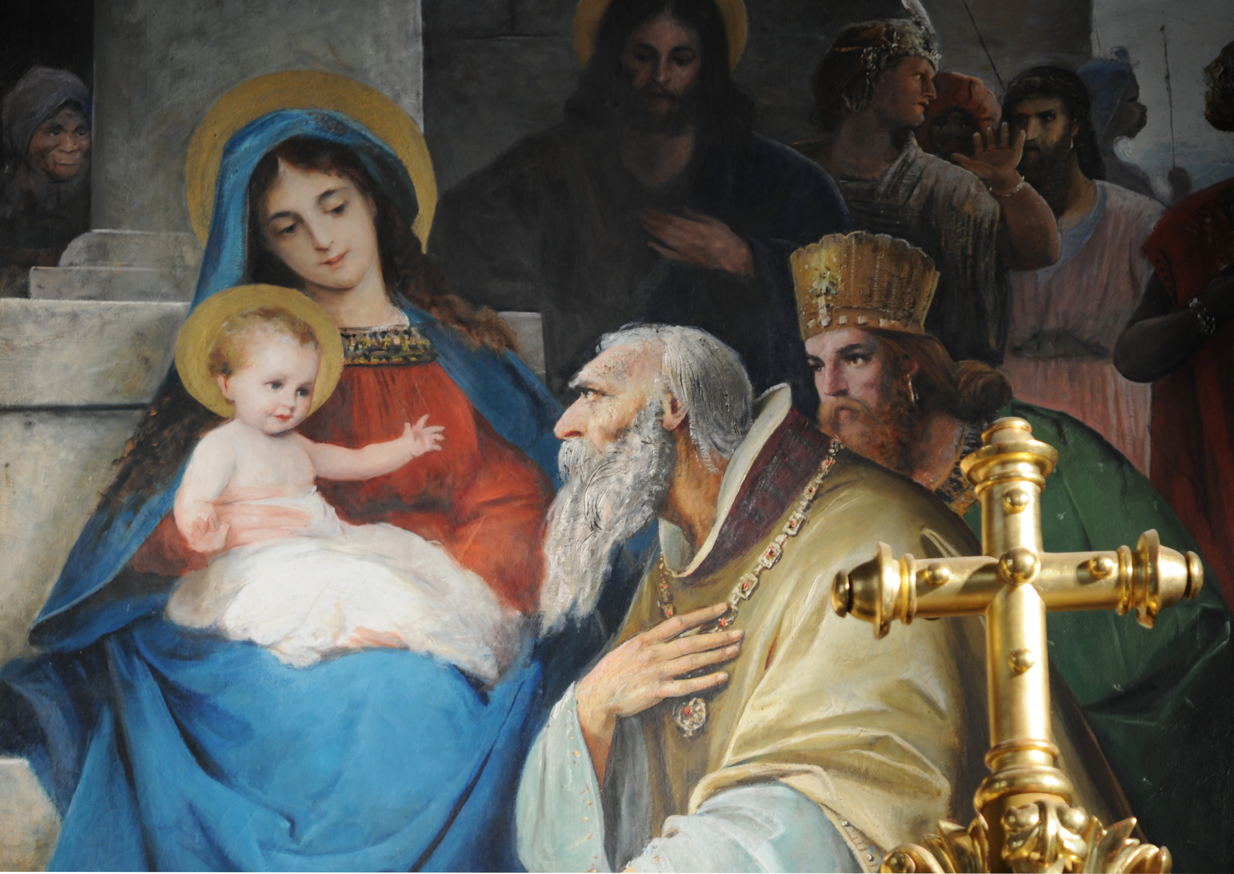 Main Altar, detail